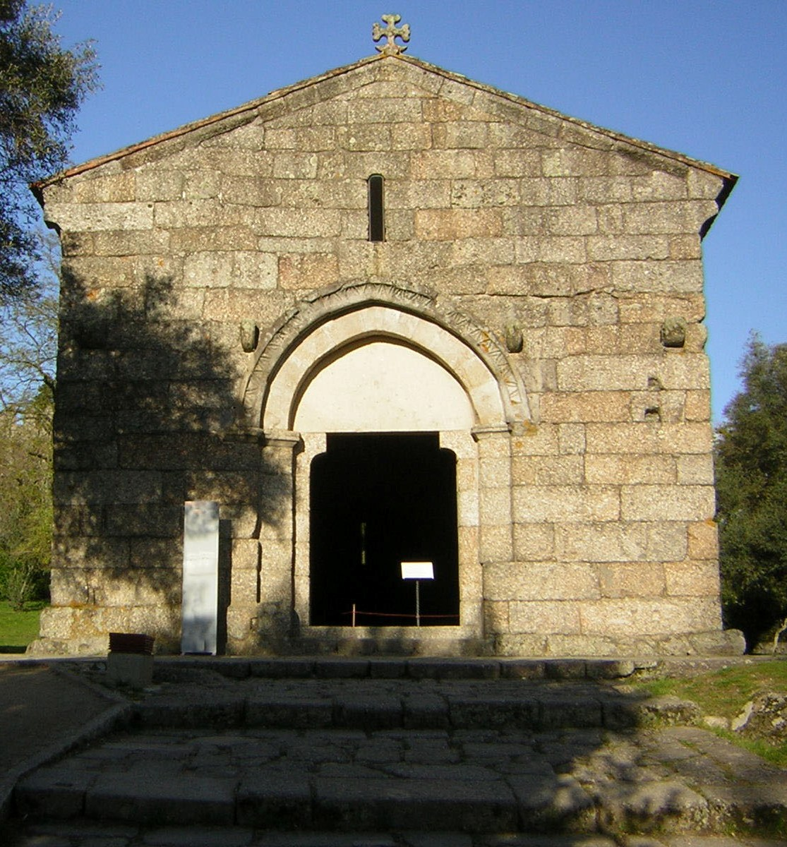 Entrada da Igreja de São Miguel do Castelo, Oliveira do Castelo, Guimarães.